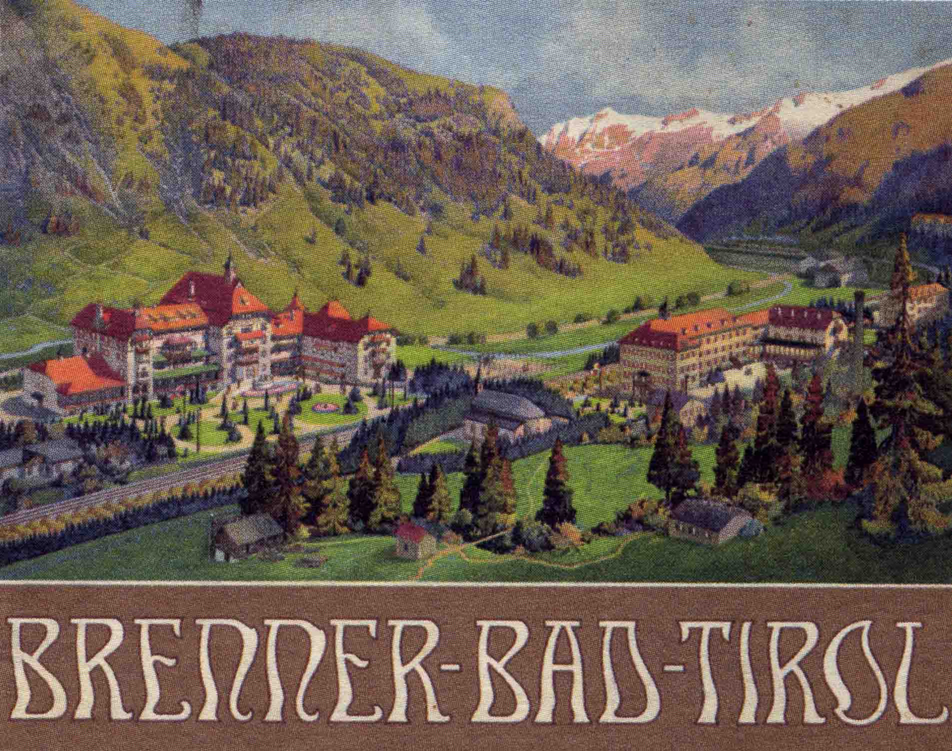 Hotel Brennerbad, Brenner (1900/1901, Prospekt)